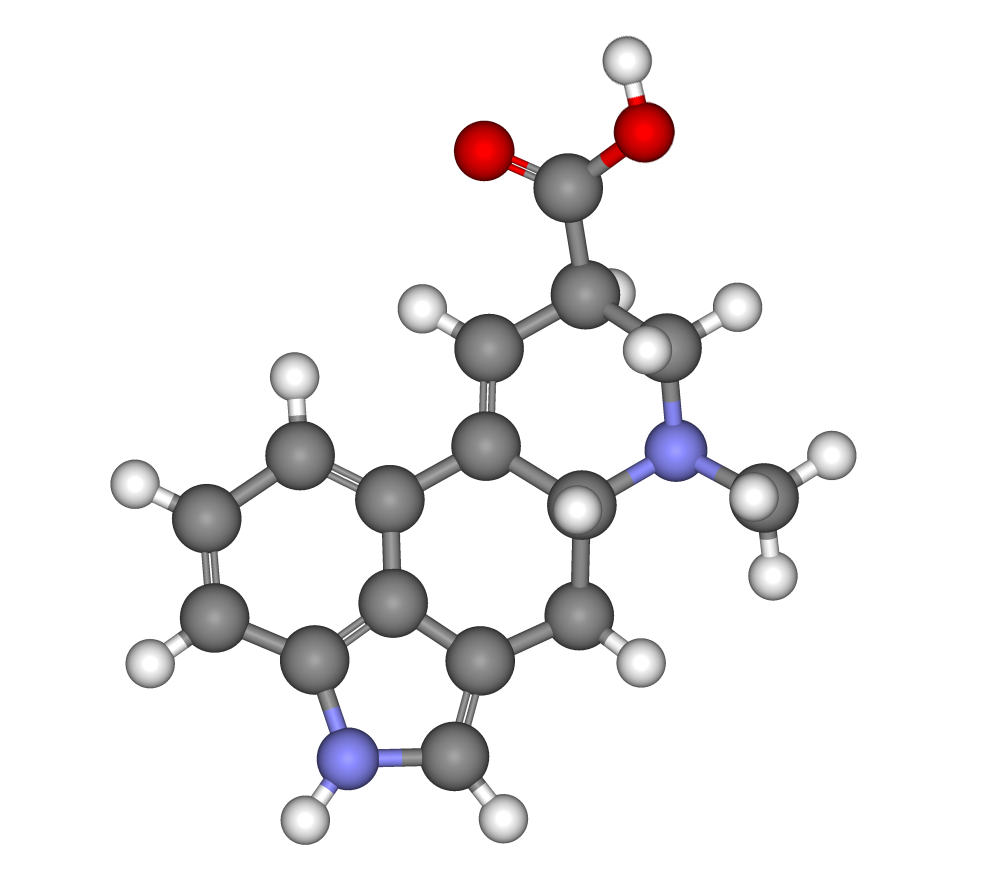 Lysergic acid